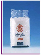 Sucre granulé